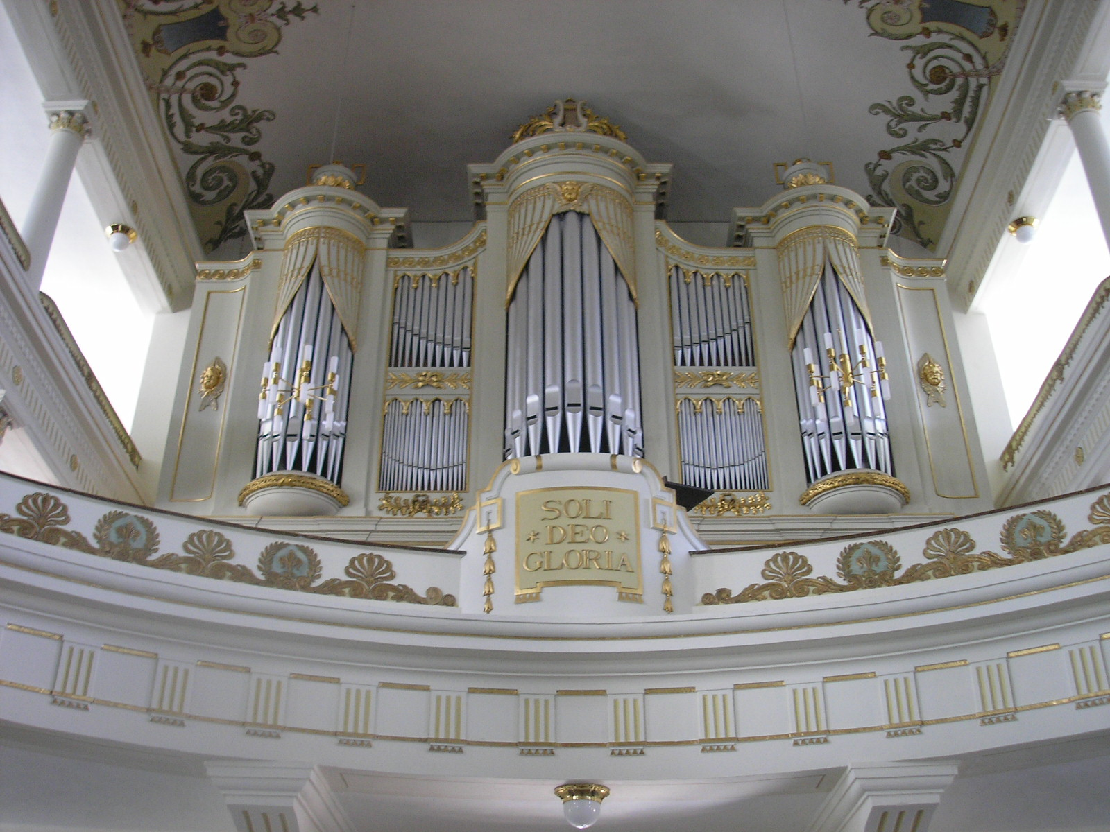 Die Orgel der Dreieinigkeitskirche in Zeulenroda (Thüringen).